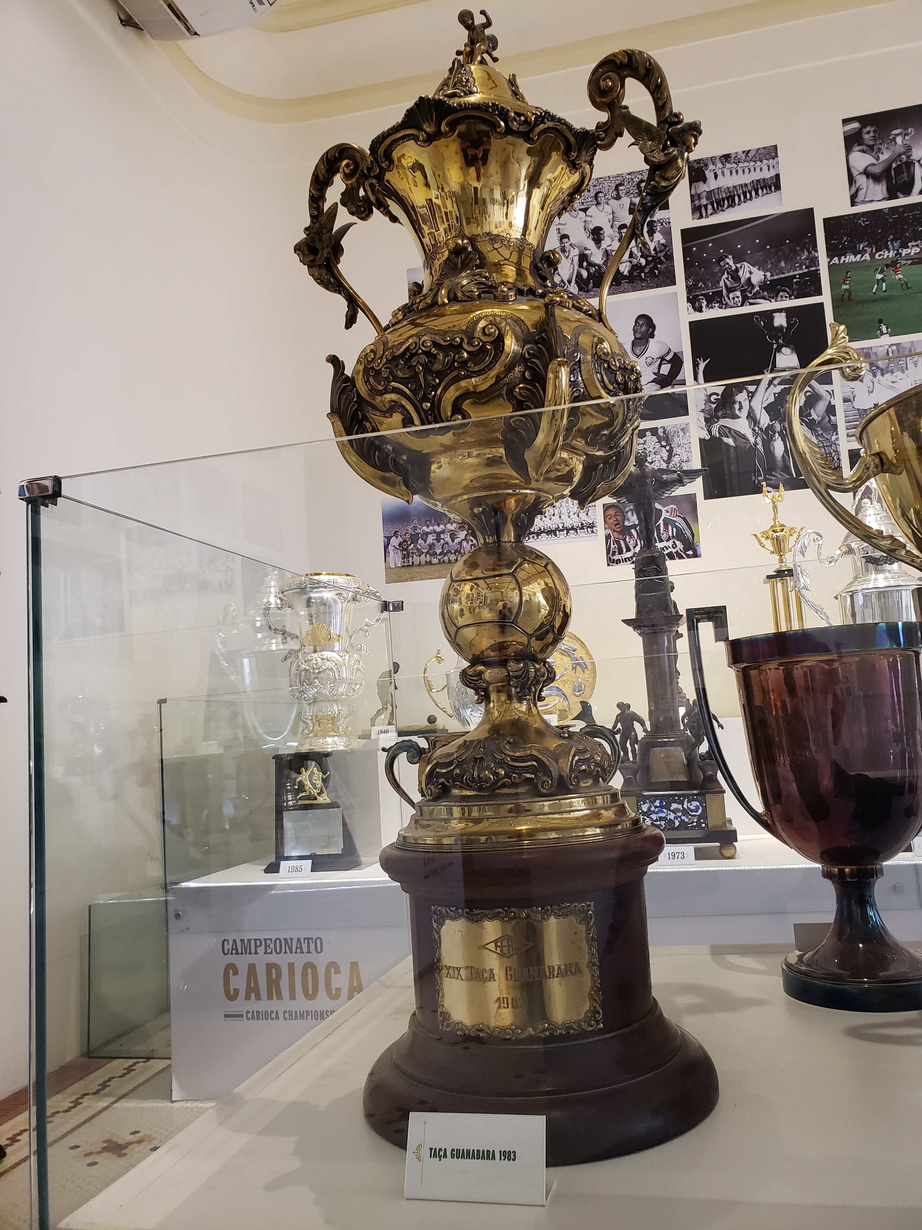 Taça Guanabara de 1983, conquistada pelo Fluminense Football Club.